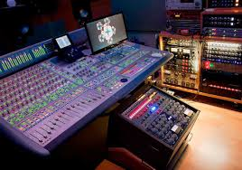 Estudi Temps Record.